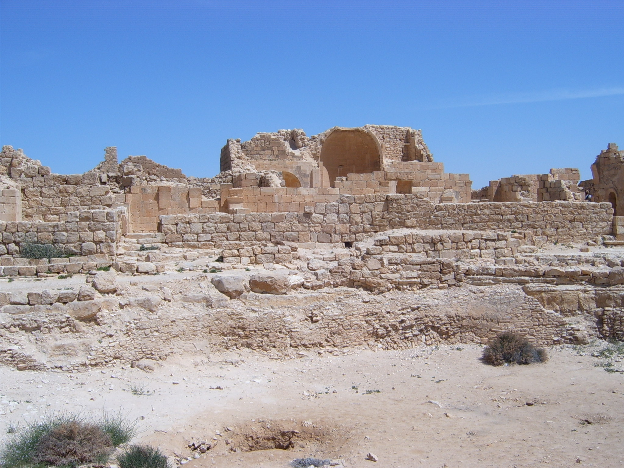 shivta - 029.jpg